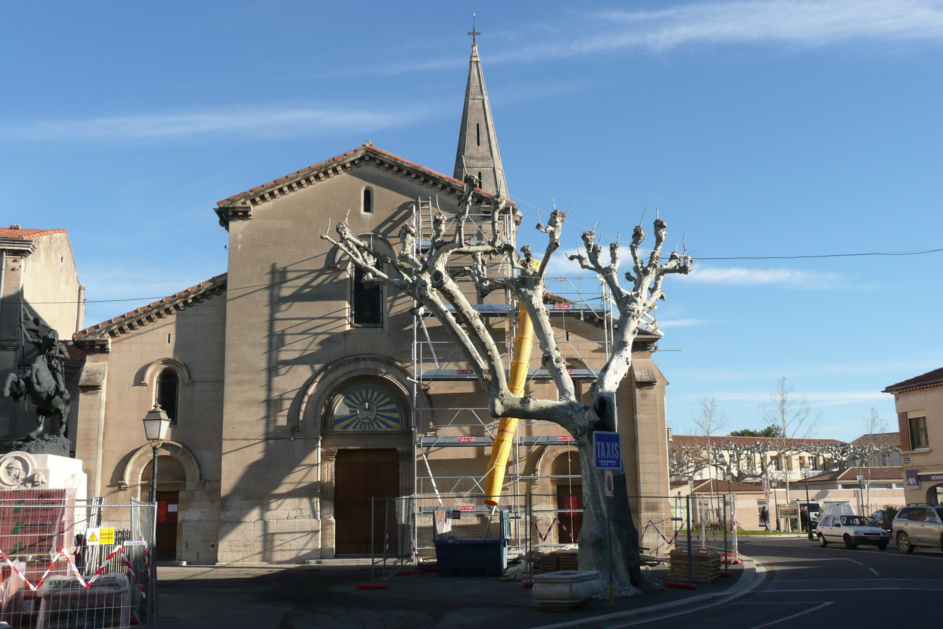 Eglise de Rognonas. Statue équestre de Jeanne d’Arc (1899) sur le monument aux morts de 1914-1918. Sculpture de Mathurin Moreau pour Jeanne. Sculpture de Pierre Le Nordez pour le cheval.